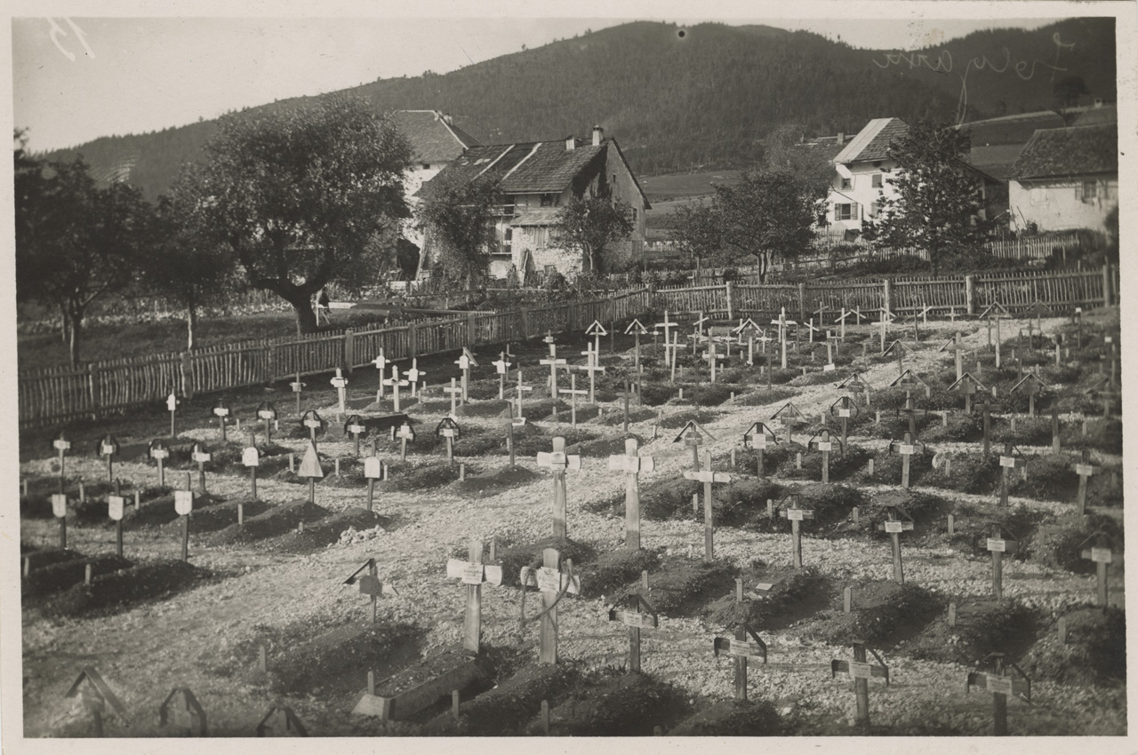 Cimitero militare di Folgaria, apparentemente creato da poco. Case e orti dietro l'area del cimitero.